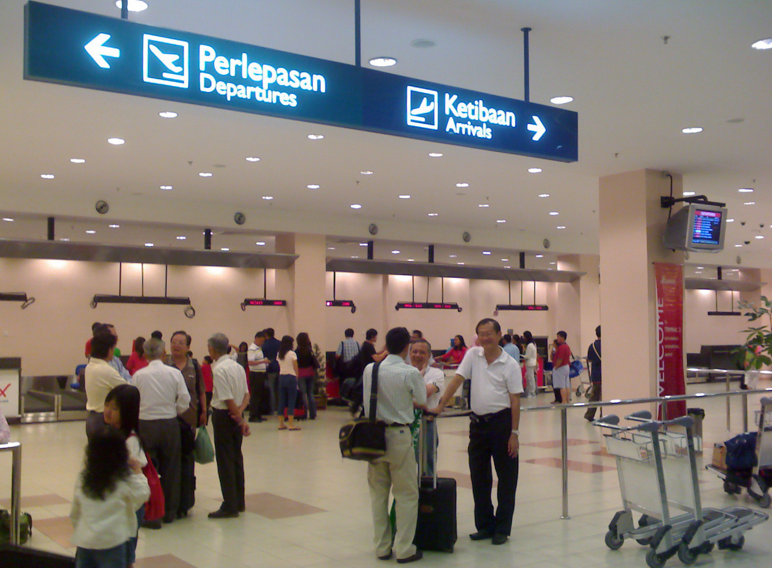 Kota Kinabalu International Airport